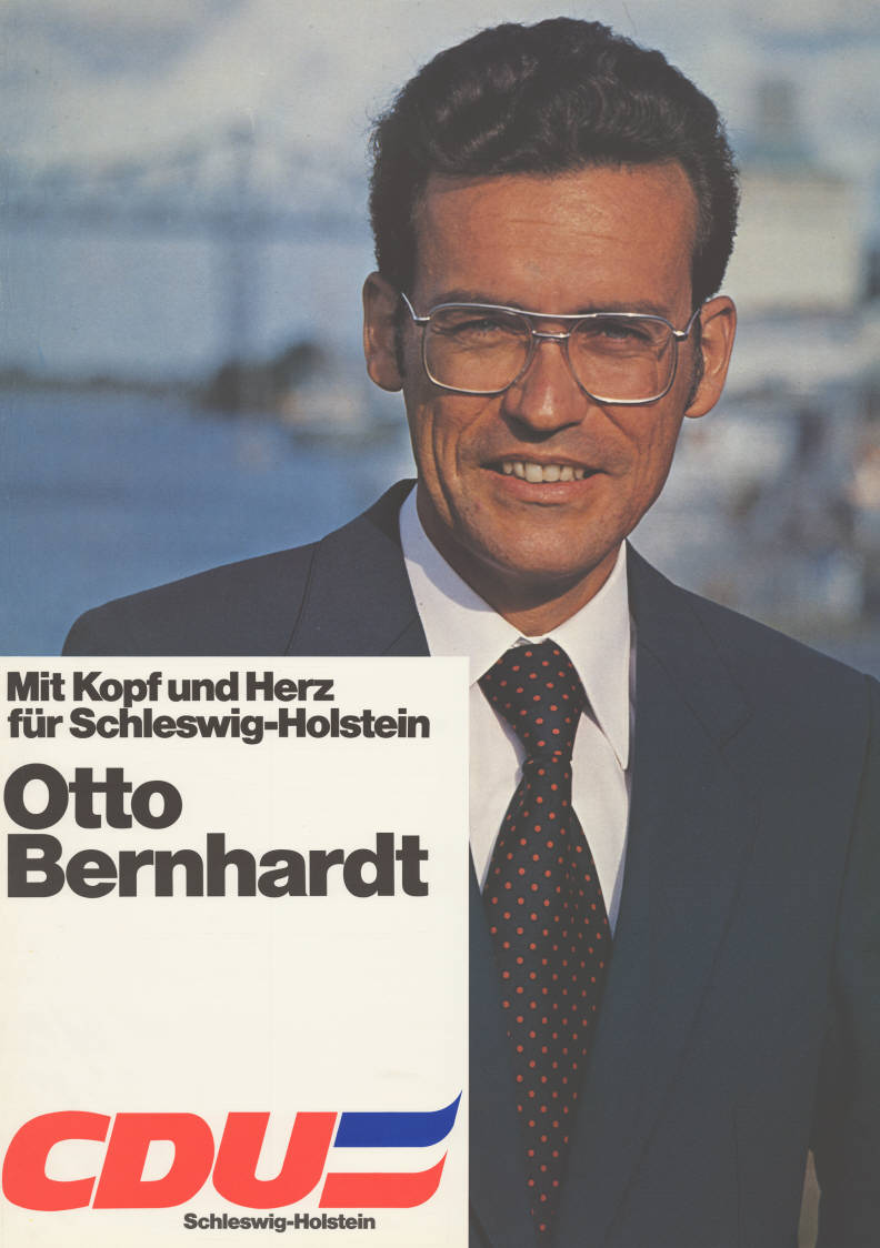 Mit Kopf und Herz für Schleswig-Holstein Otto Benhardt CDU Schleswig-Holstein Abbildung: Foto Plakatart: Kandidaten-/Personenplakat mit Porträt Auftraggeber: Verantw.: CDU Schleswig-Holstein Objekt-Signatur: 10-012 : 413 Bestand: Landtagswahlplakate Schleswig-Holstein (10-012) GliederungBestand10-18: Landtagswahlplakate Schleswig-Holstein (10-012) » Landtagswahl am 29.4.1979 » Kandidatenplakate Lizenz: KAS/ACDP 10-012 : 413 CC-BY-SA 3.0 DE